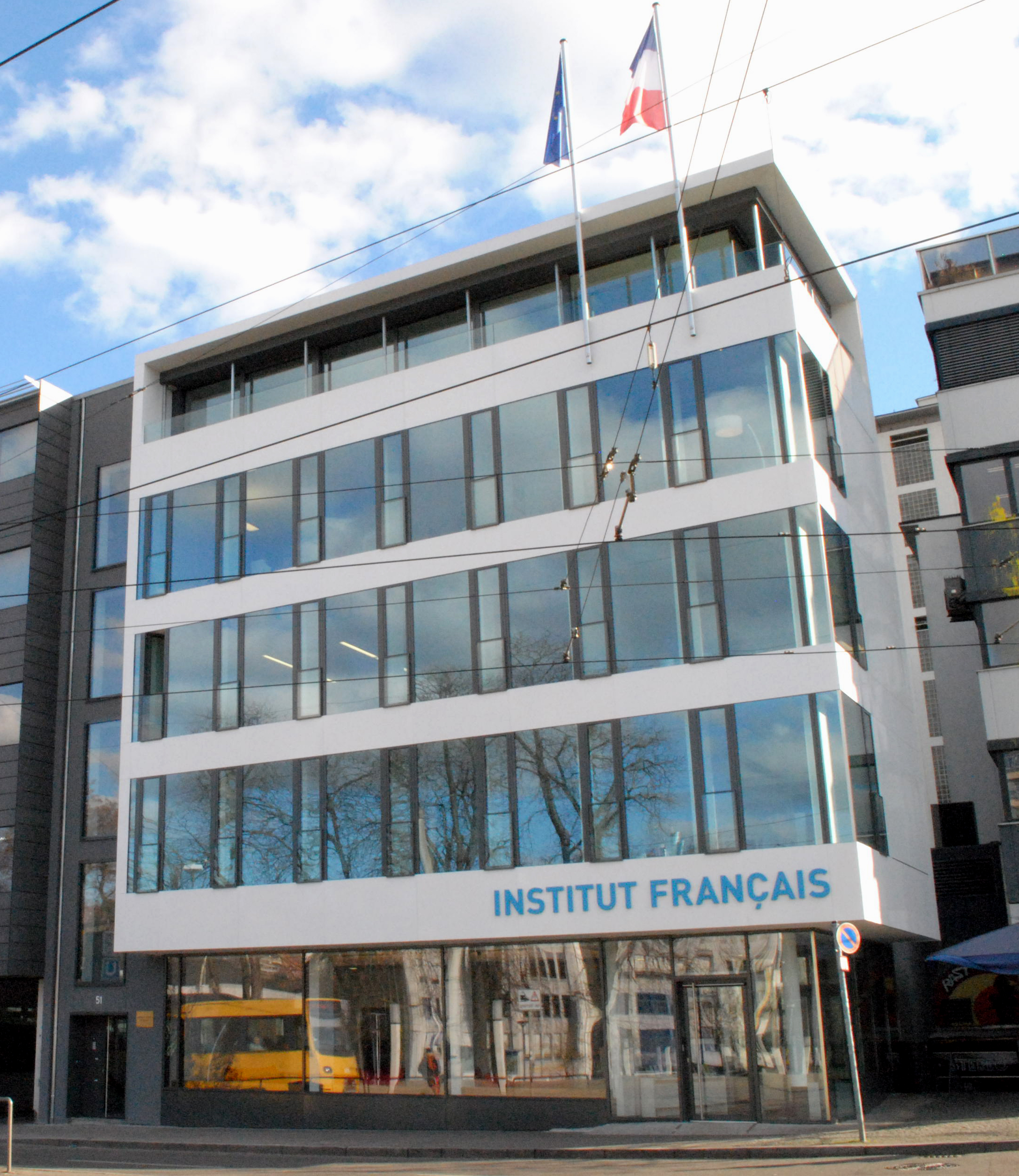 Das Institut français befindet sich im Zentrum Stuttgarts am Berliner Platz.